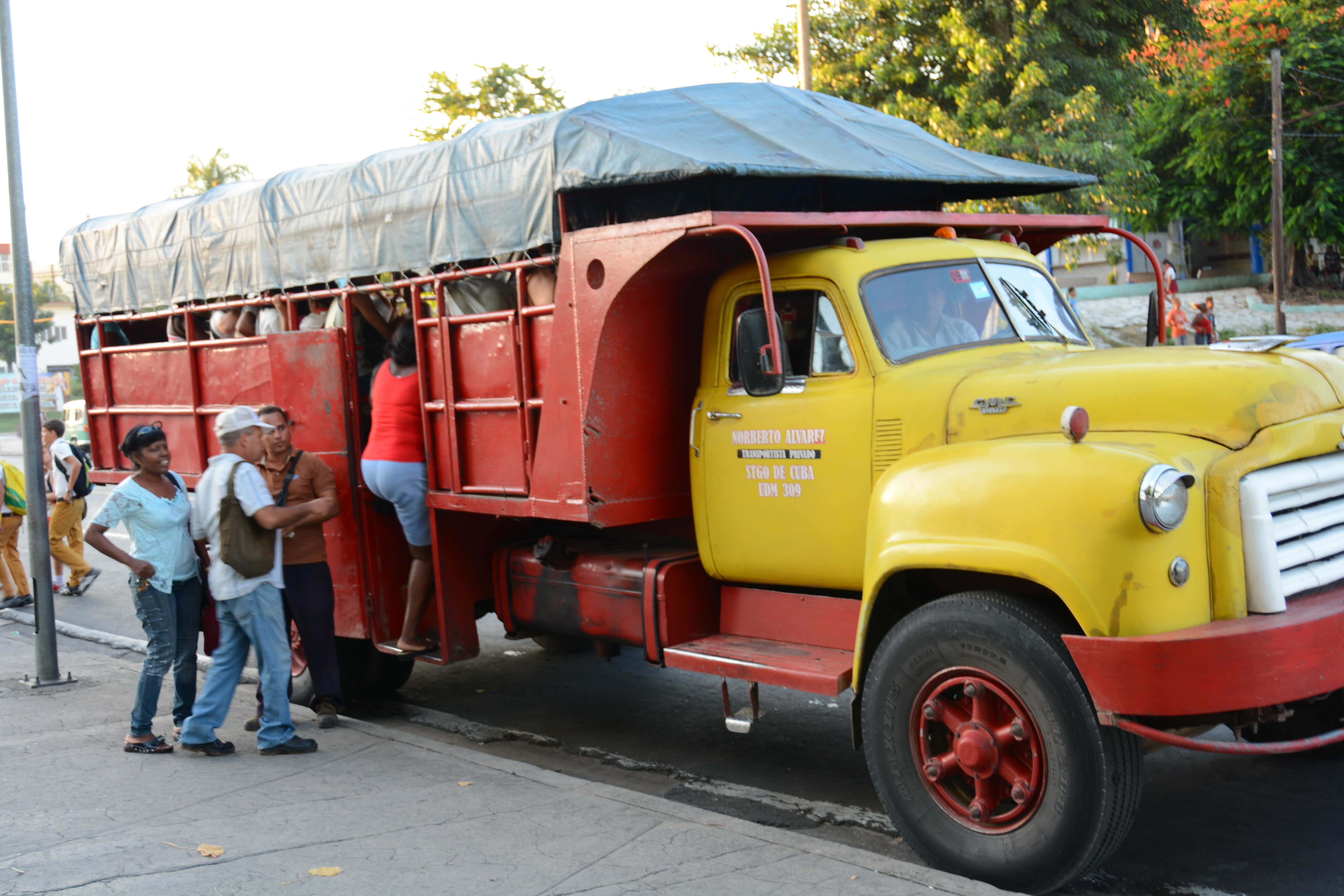 Zum Personentransport umgebauter LKW in Santiago de Cuba